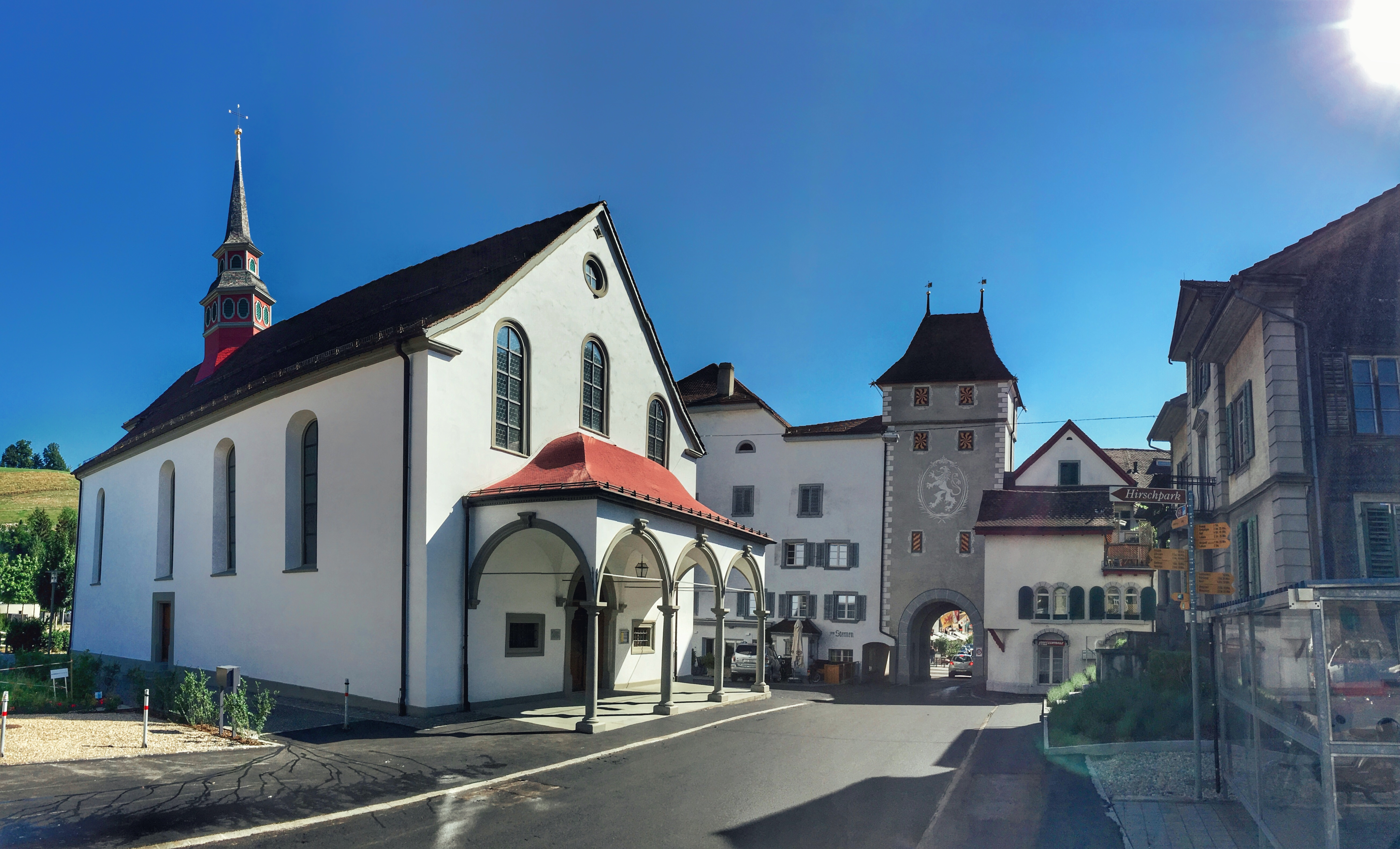 Heiligblut-Kappelle mit Obertor